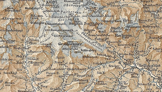 Karte der Glocknergruppe